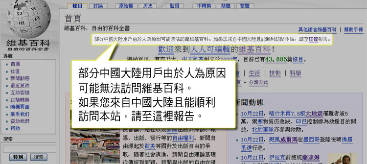 中文維基百科2005年10月被中國大陸政封鎖的首頁告示。